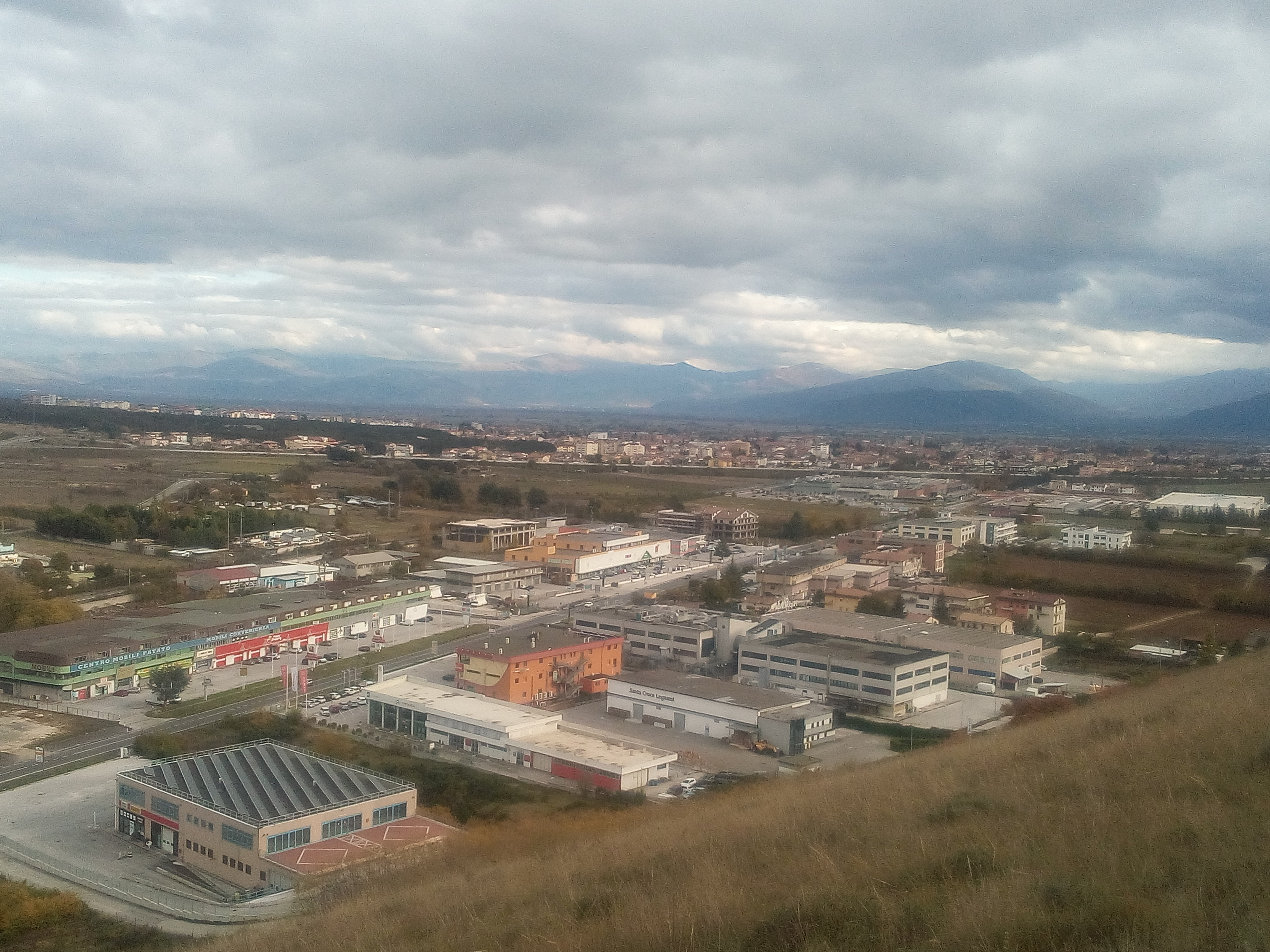 Centro commerciale di Cappelle dei Marsi ed Avezzano in Abruzzo